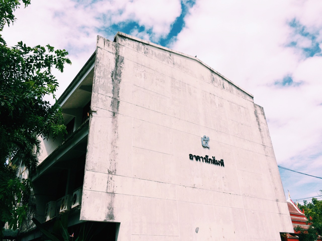 อาคาร5 โกสัมพี